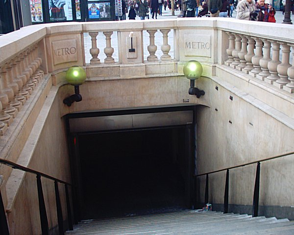 Entrée de la station Franklin Roosevelt du Métropolitain de Paris.